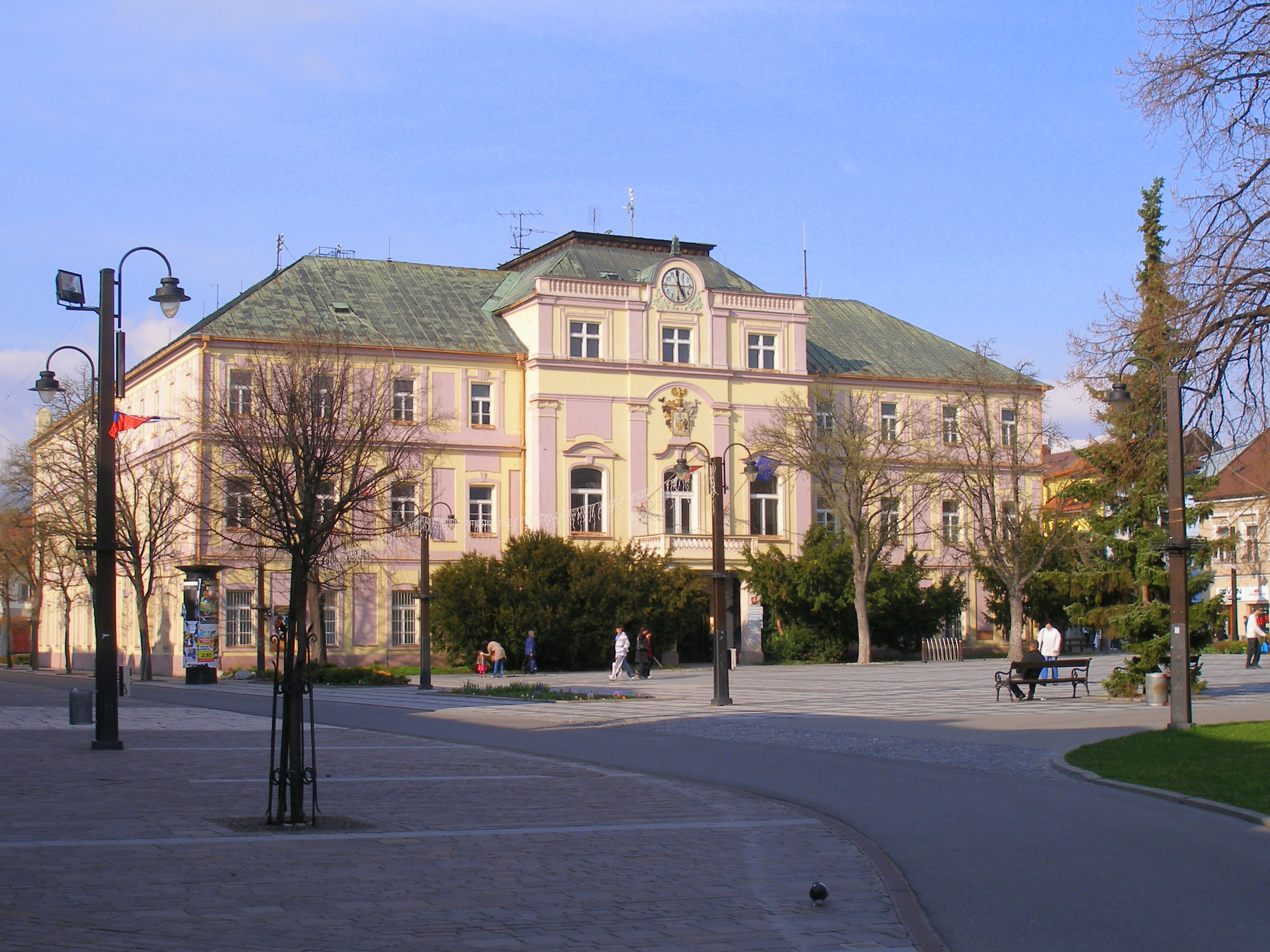 Mesto Liptovský Mikuláš. Slovensko